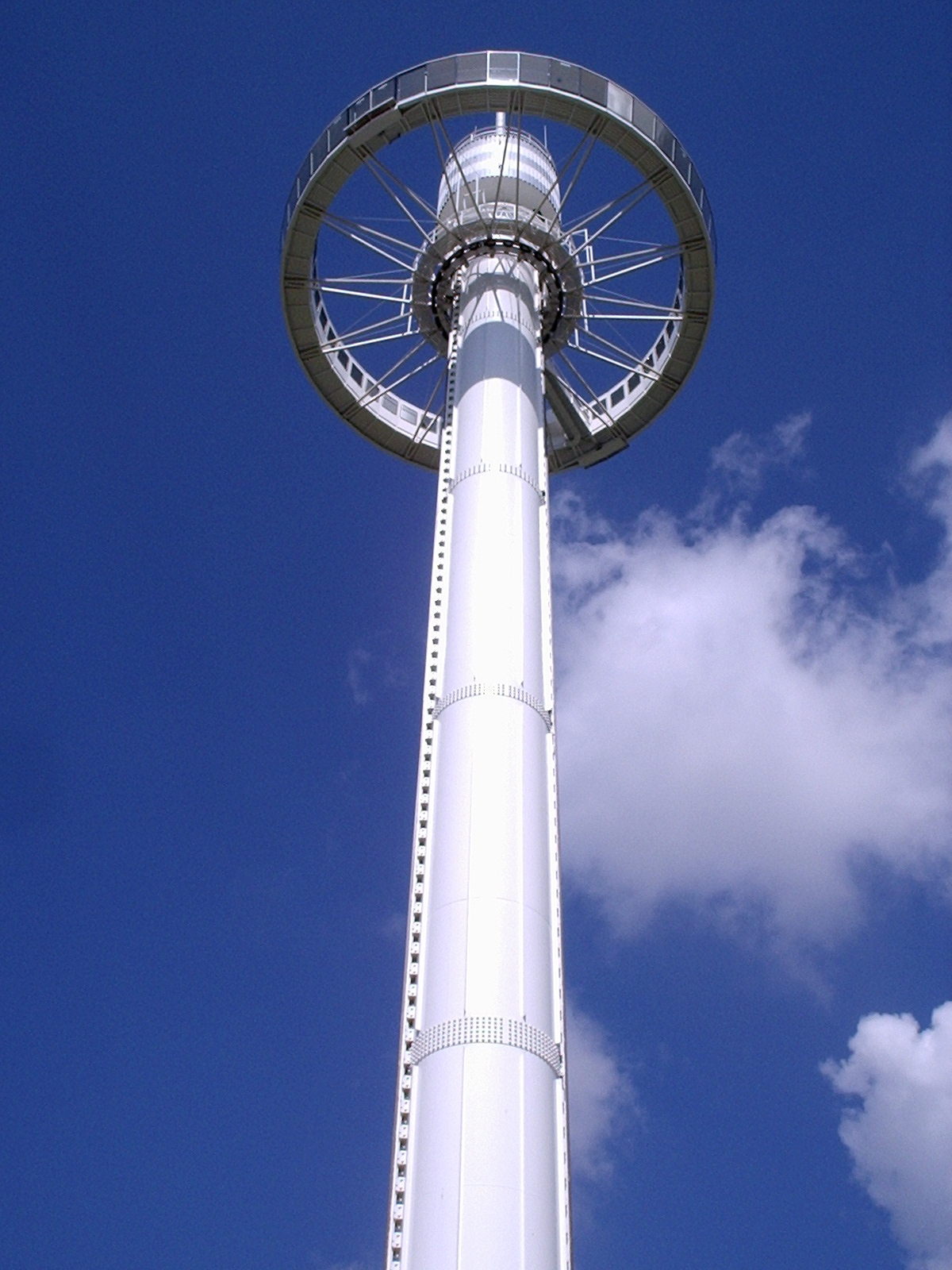 La Gyrotour du Futuroscope de Poitiers, le 10 mai 2006 vers midi. (Photo personnelle T. Chabrout-Jullien.